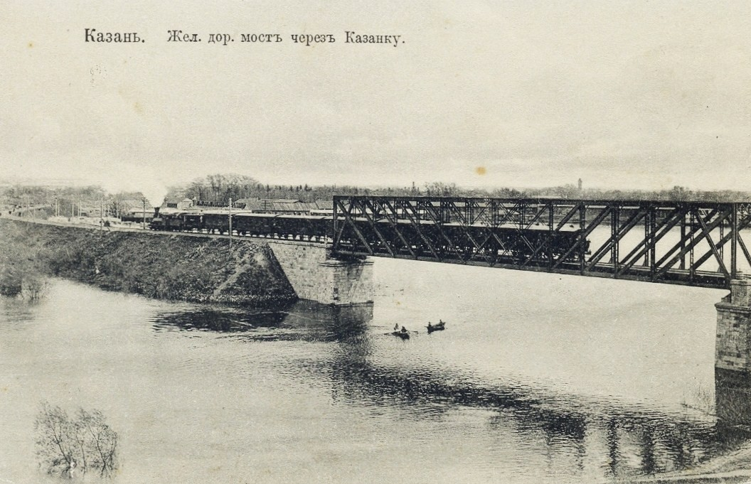 Железнодорожный мост через реку Казанку (г. Казань). Надписи над изображением (на лицевой стороне открытки): «Казань. Жел. дор. мостъ черезъ Казанку.». Надписи на оборотной стороне открытки: «Открытое письмо. – ВСЕМIРНЫЙ ПОЧТОВЫЙ СОЮЗЪ. РОССIЯ. Union postale universelle.». «Репрод. воспрещ.». «J. M. J. K. No 161.». «А 76 45».